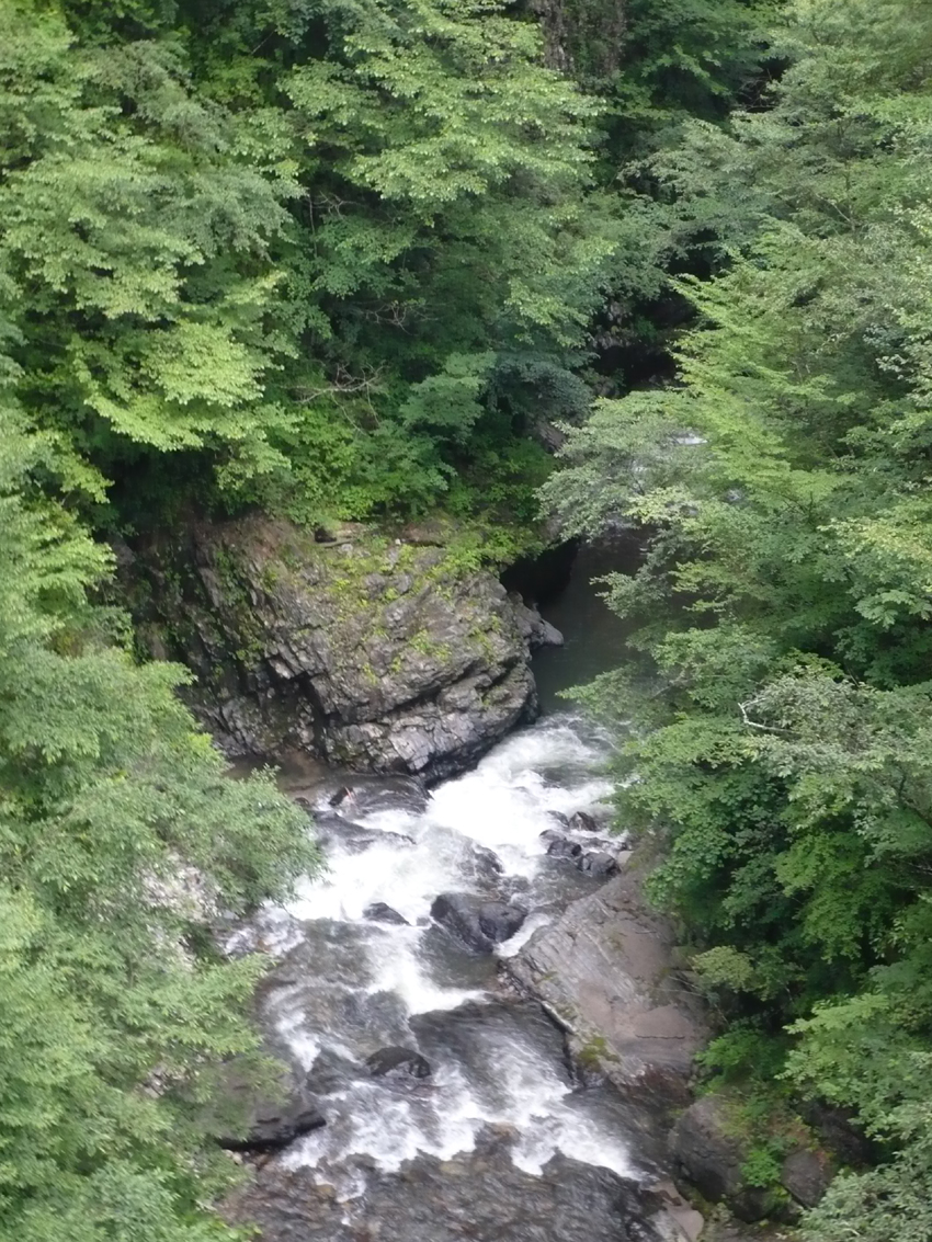 おいらん渕